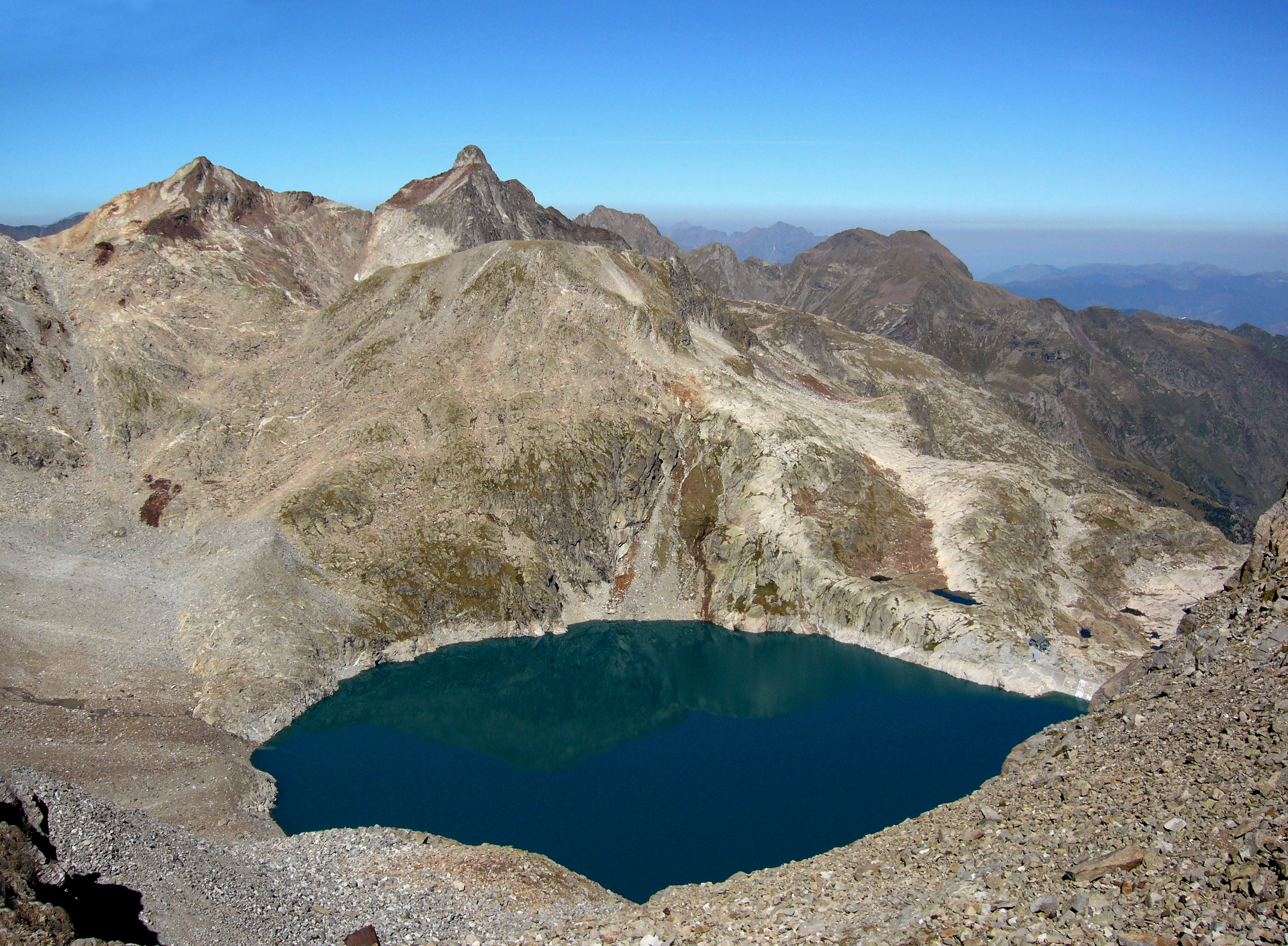 Pic des Spijeoles, lac du Portillon et refuge Jean Arlaud